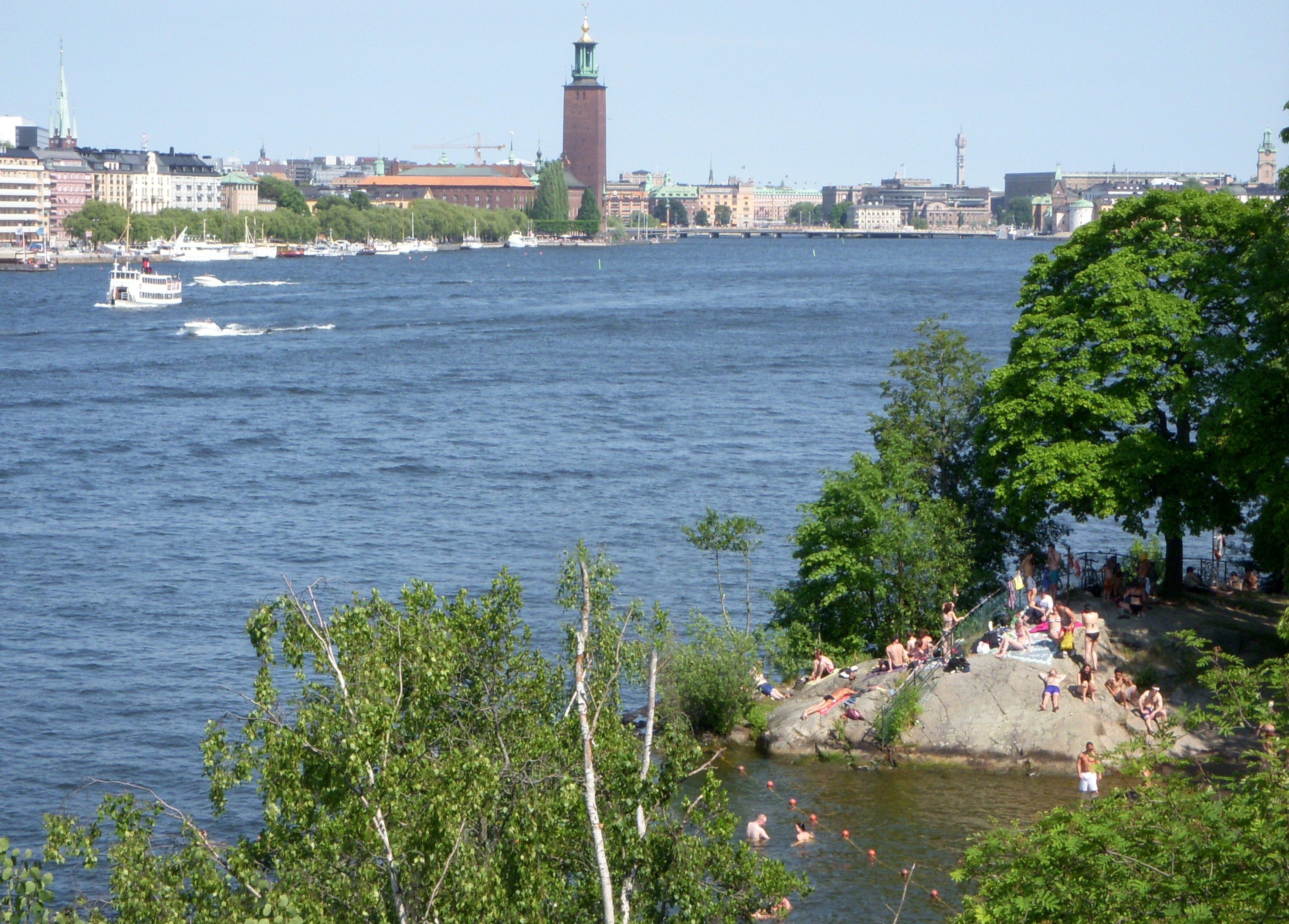 Långholmens klippad